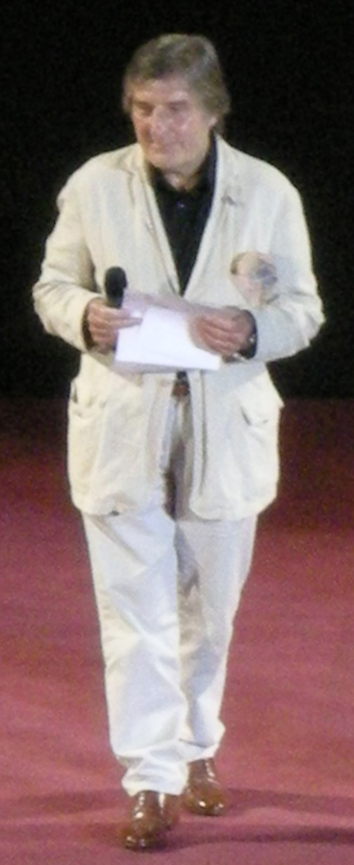 Taormina film festival 2009, emmanuel ungaro